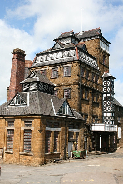 Hook Norton Brewery outside